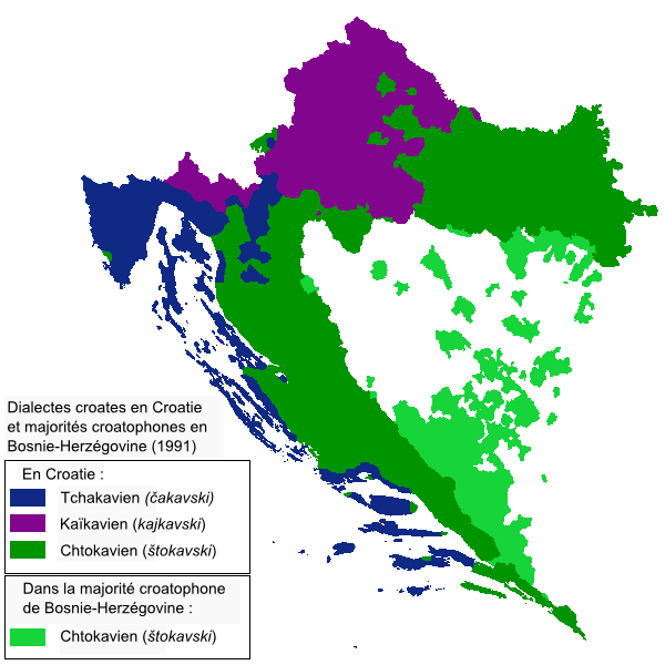 Traduction de File:Croatian dialects in Cro and BiH 1.PNG